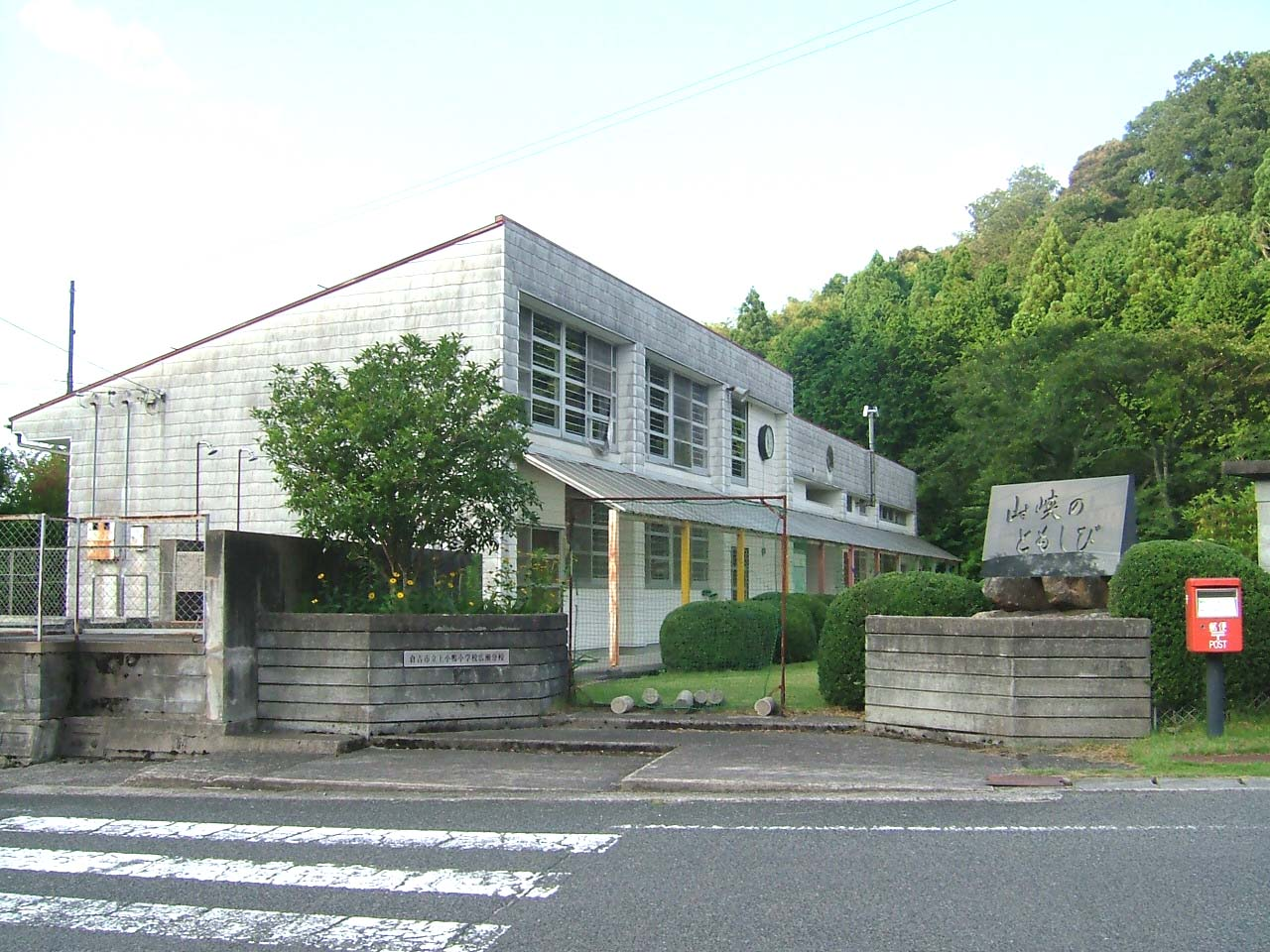 倉吉市立上小鴨小学校広瀬分校